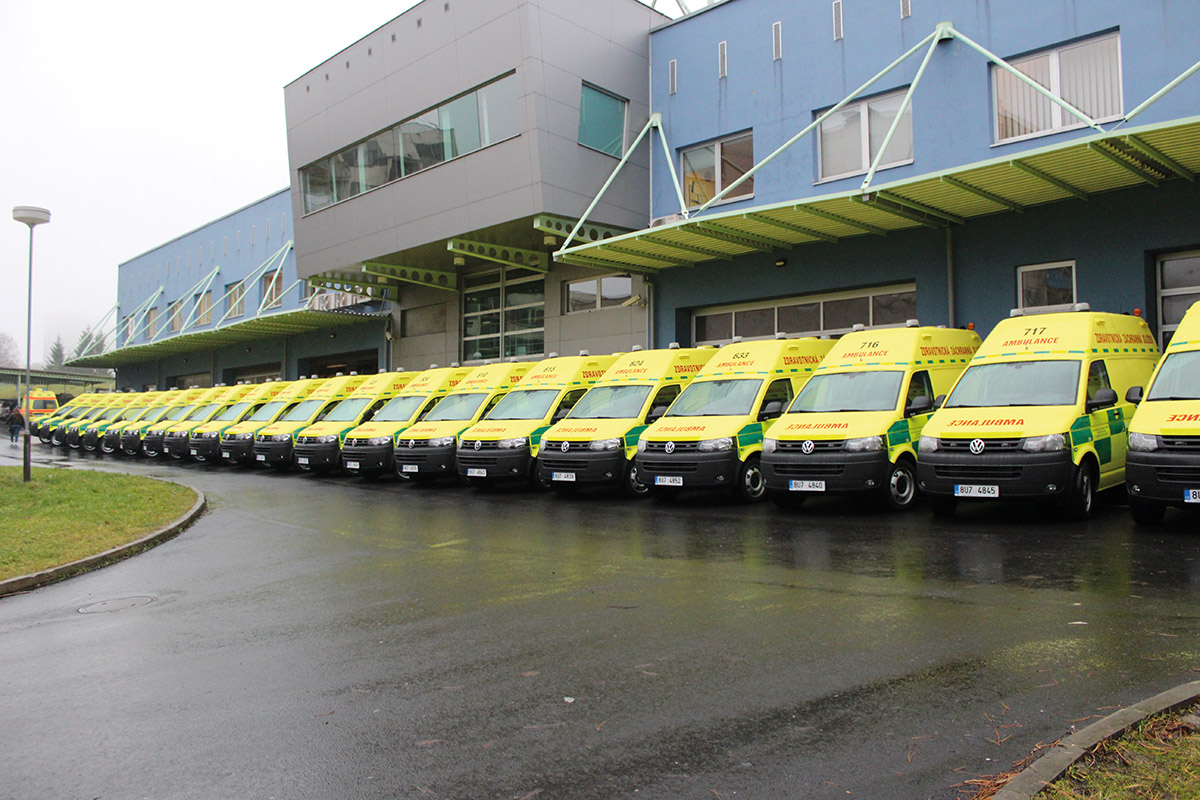 Zdravotnická záchranná služba Ústeckého kraje zzsuk